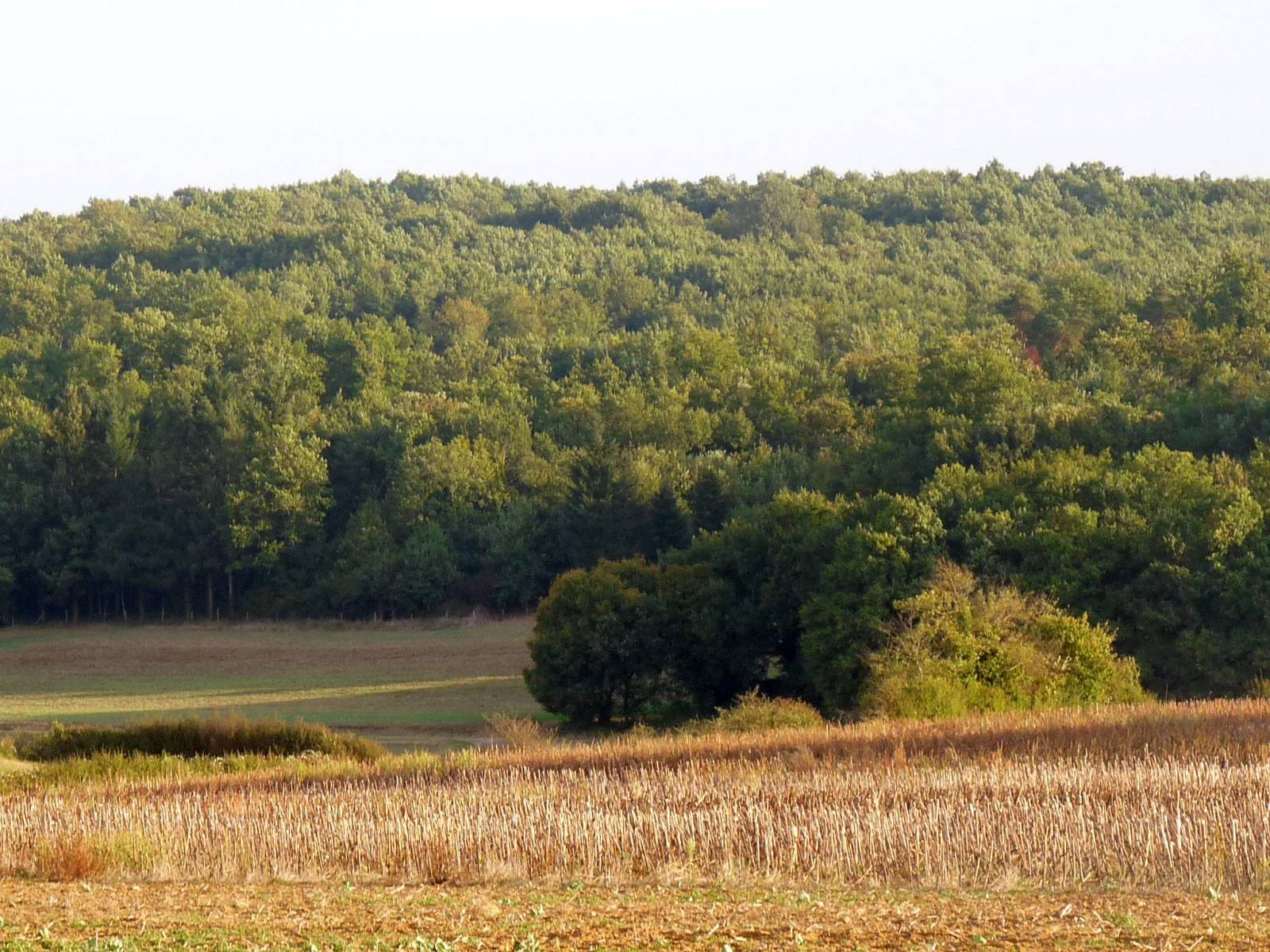 forêt de Quatre Vaux, Charente, France; vue depuis les Houillères, Agris